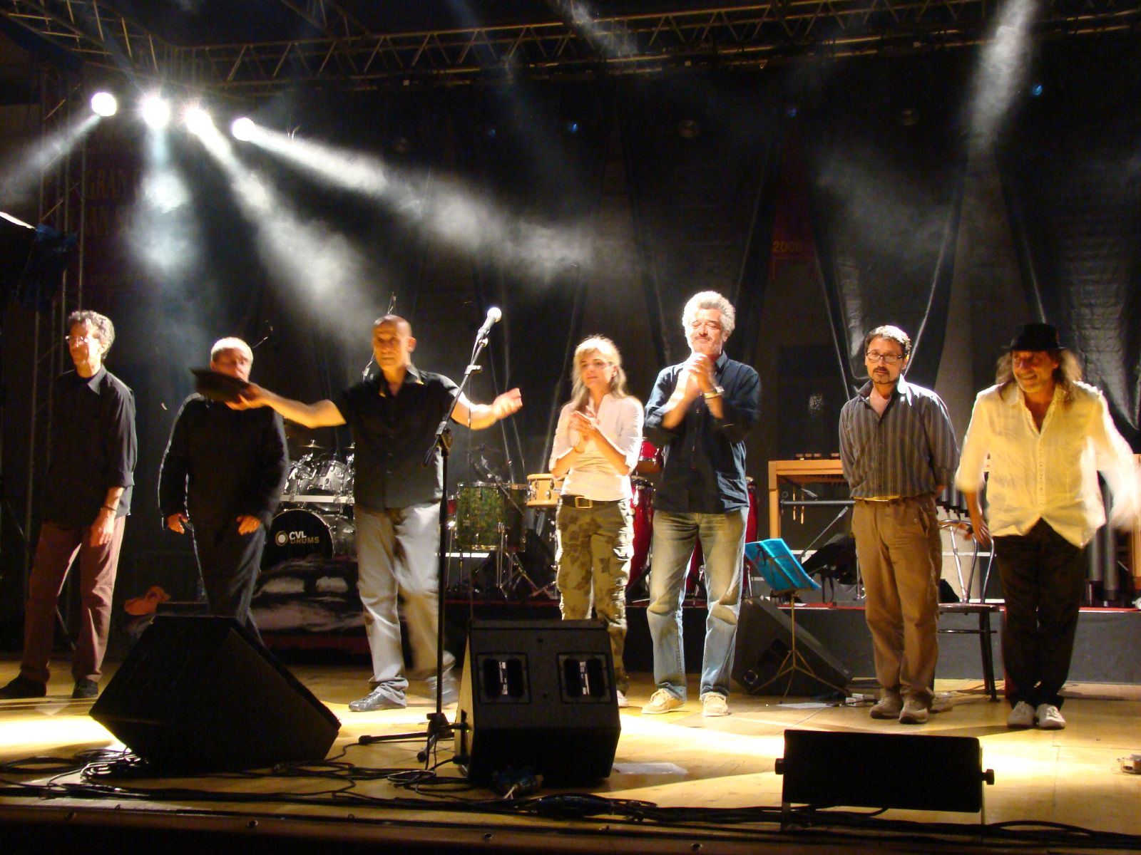 Piccola Orchestra Avion Travel in 2007.